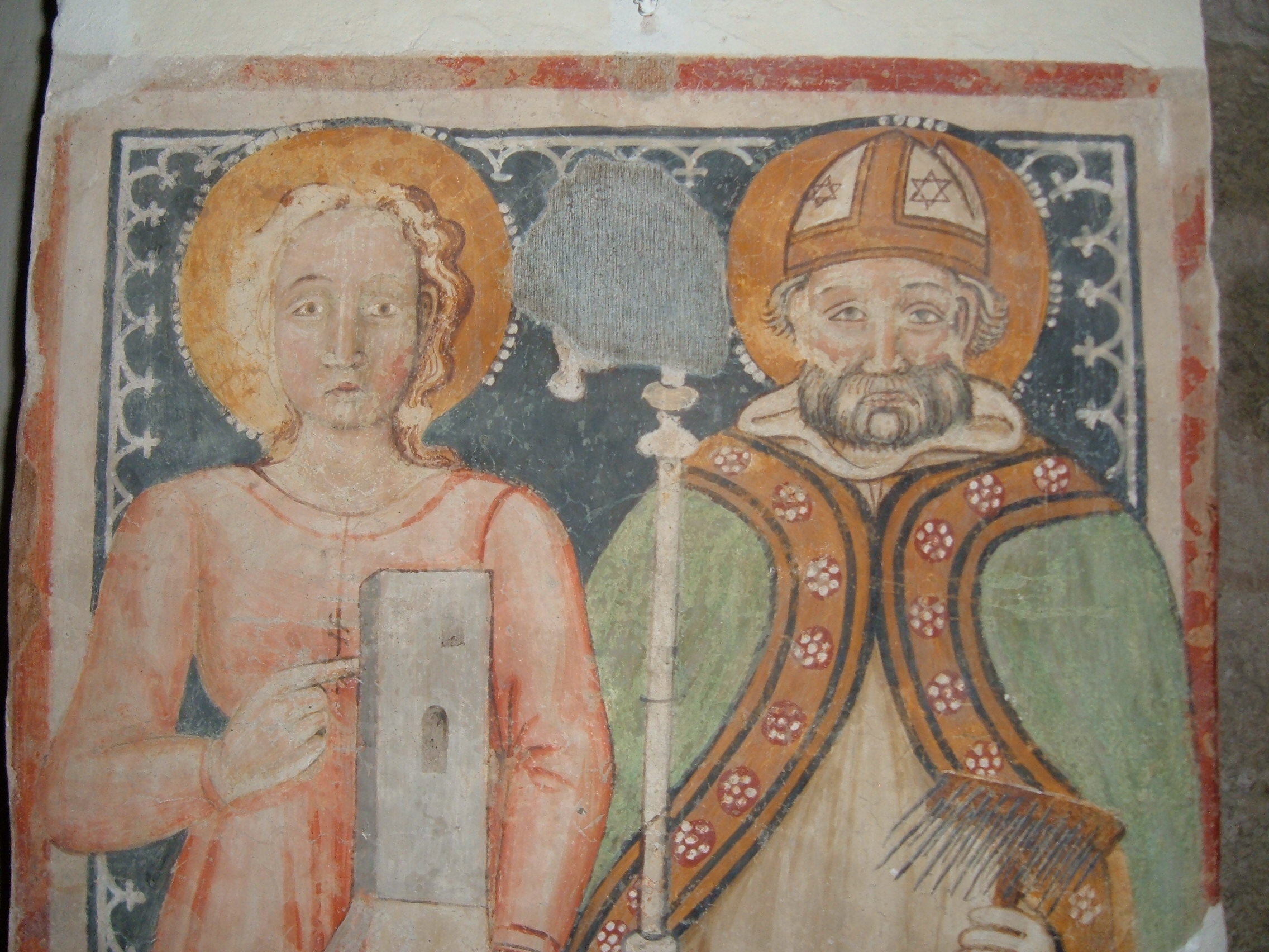 Chiesa di Santa Maria Impensole, a Narni. Interno: affresco.